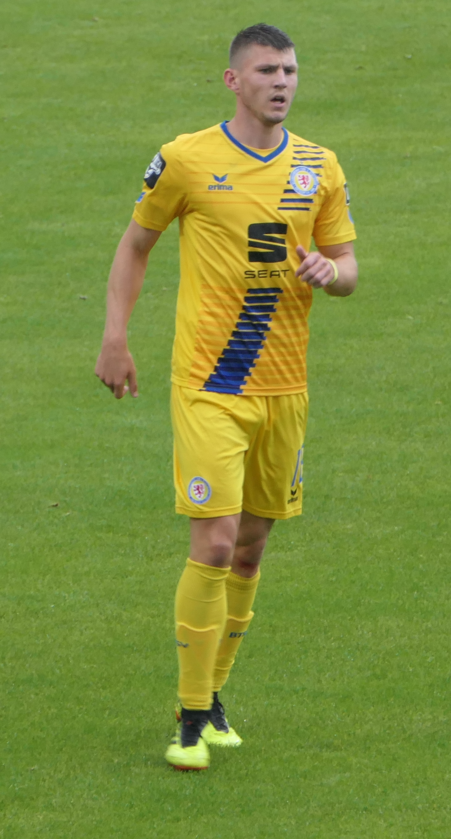 Der Fussballprofi Robin Becker im Trikot von Eintracht Braunschweig beim Auswärtsspiel bei der SpVgg Unterhaching am 01.09.2018.